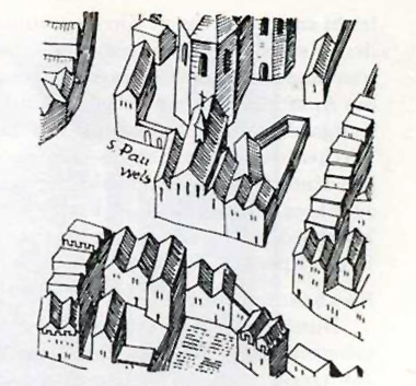 Stadtansicht nach Mercator 157. Ausschnitt St. Paul